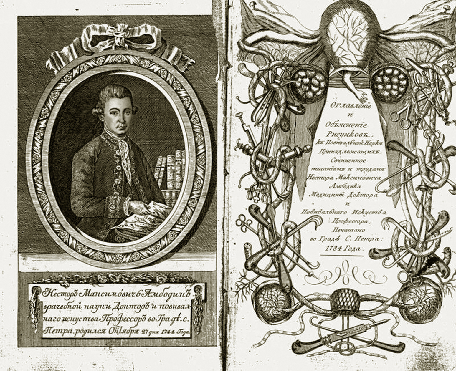 Титульный лист руководства профессора Нестора Максимовича Максимовича-Амбодика "Искусство повивания или Наука о бабичьем деле"